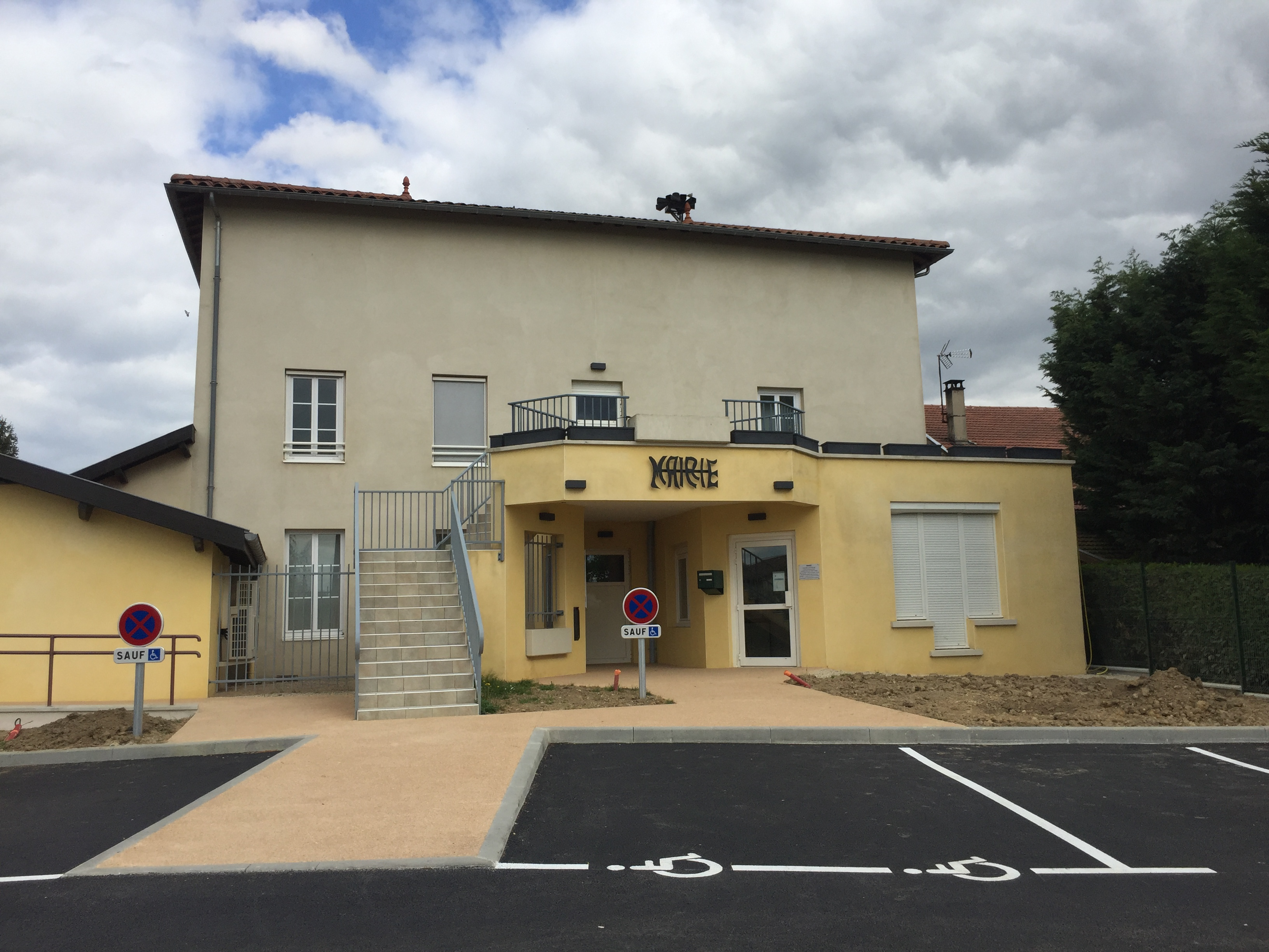 Image du village deMonthieux, dans l'Ain, en France.